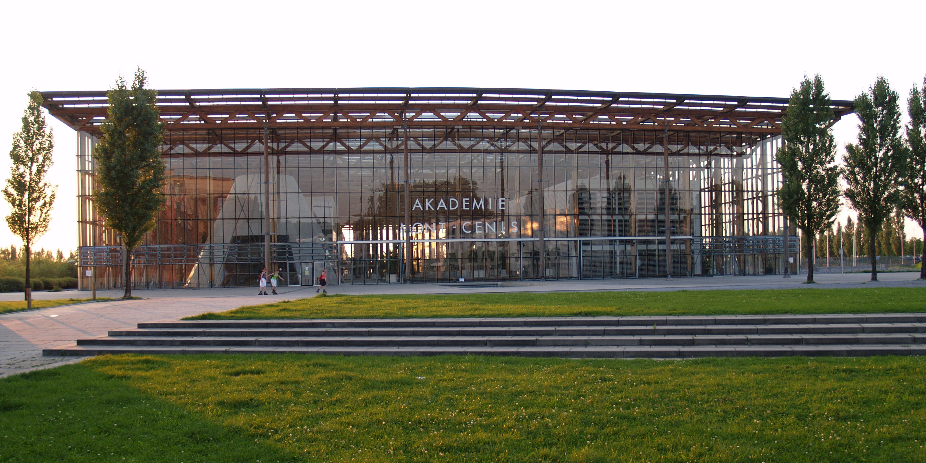 Akademie Mont-Cenis, die Fortbildungsakademie des Innenministeriums NRW in Herne